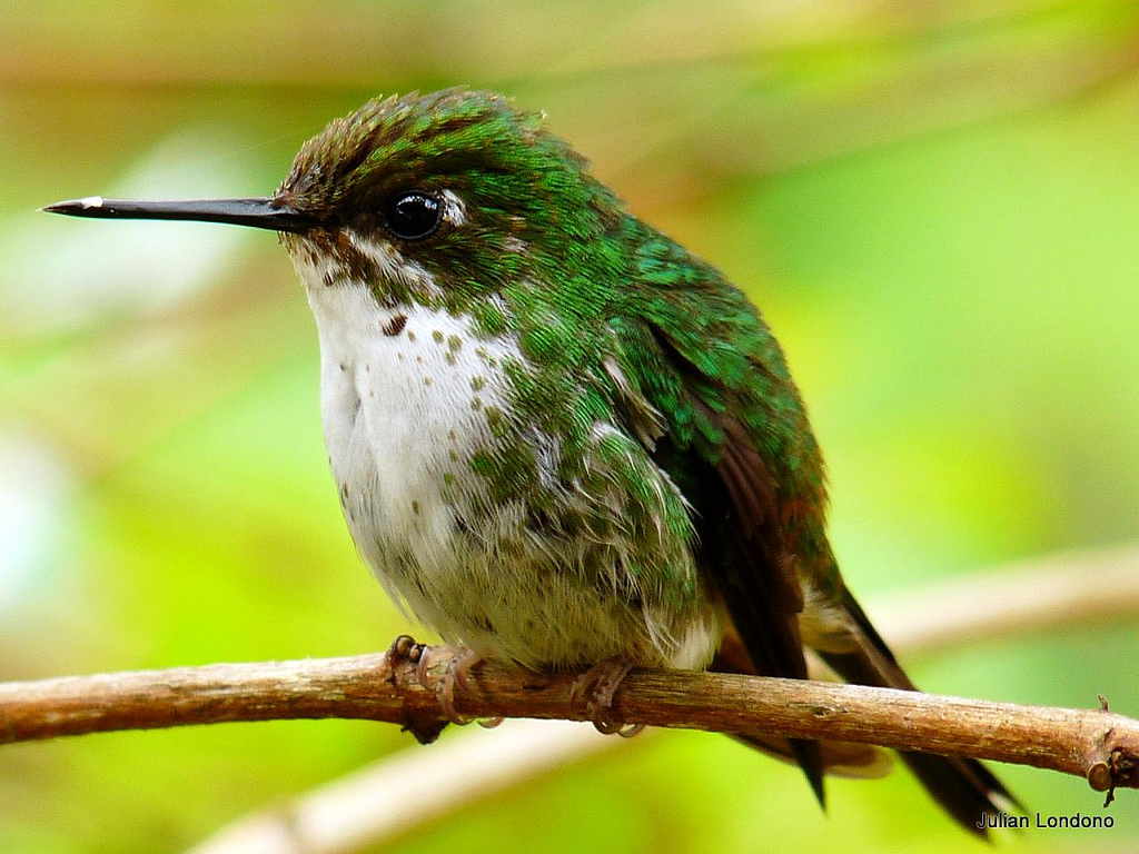 A female Ocreatus underwoodii at "El Bosque Cafetero", Manizales, Colombia.